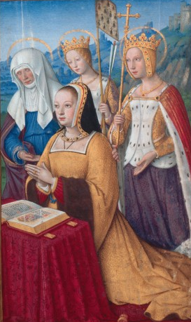 Cote : Latin 9474 Folio : 2v-3 Légende : anne de bretagne priant Origine : tours Siècle : 16ème siècle Date : vers 1503-1508 Artiste : jean.bourdichon